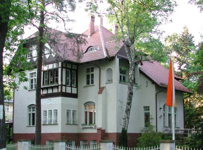 Corpshaus der Marchia Berlin, die 1957 erworbene Villa Drimborn in der Bernadottestraße 68, die bis heute Sitz des Corps ist, steht seit 2010 unter Denkmalschutz (OBJ-Dok-Nr.: 09020114).